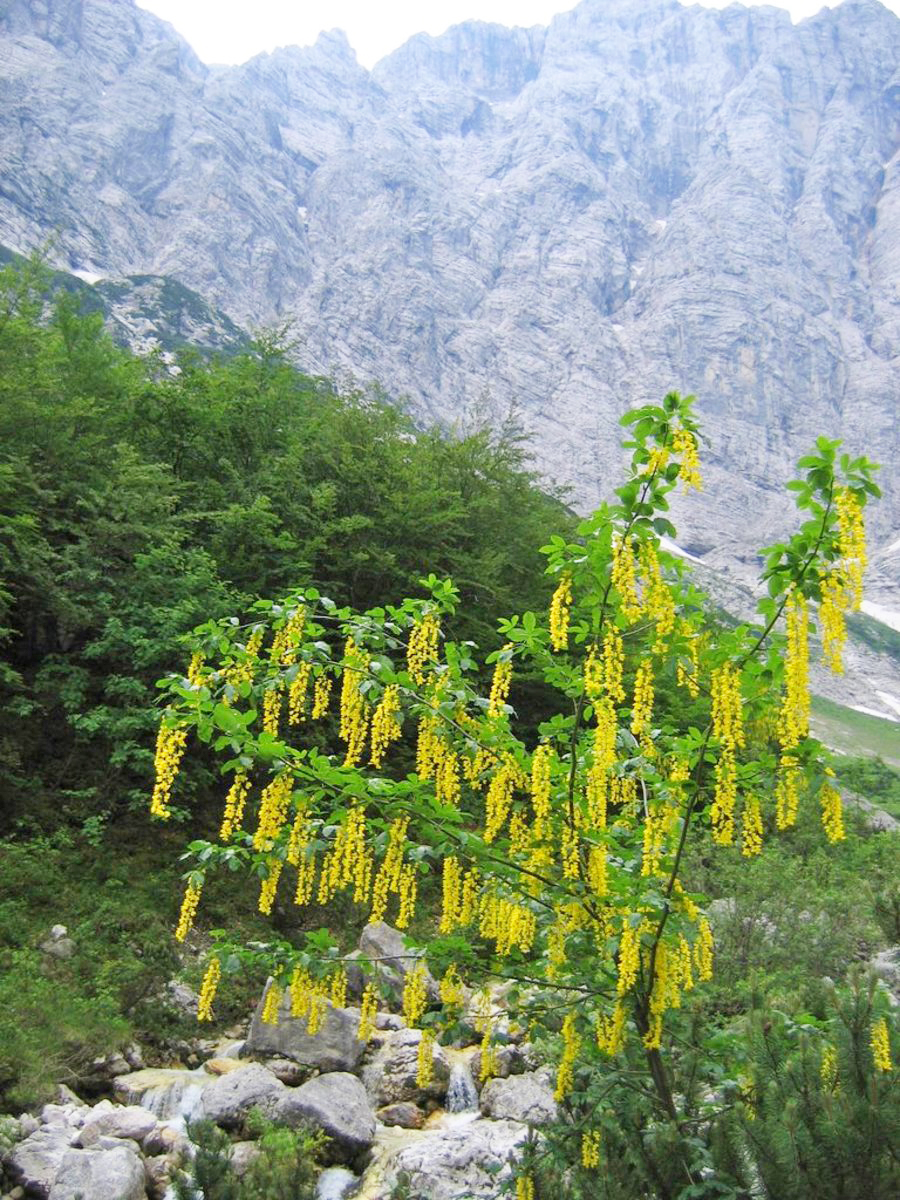 Alpski nagnoj v dolini Vrat.